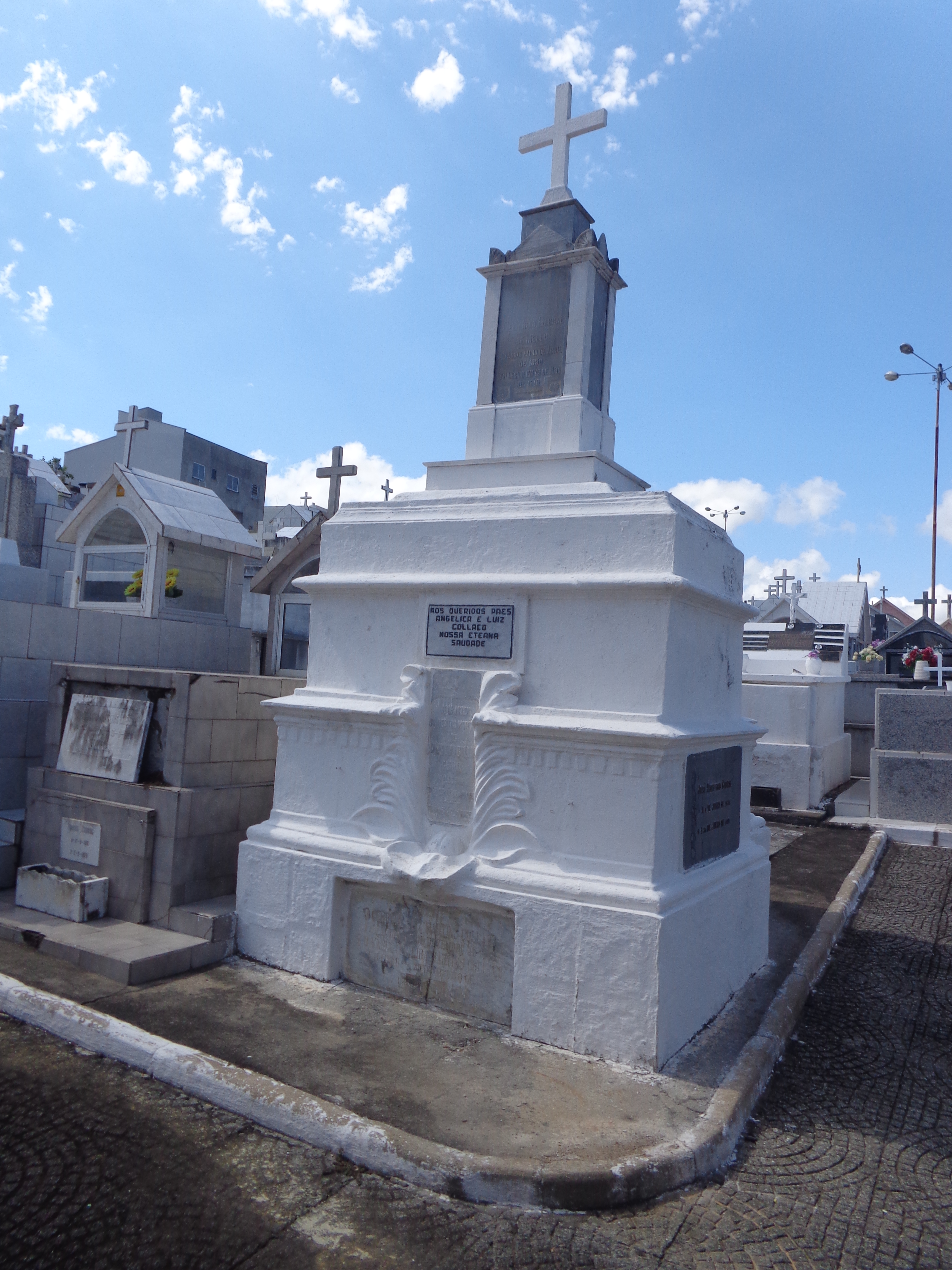 Sepultura do Coronel Collaço, Cemitério Municipal de Tubarão, Santa Catarina